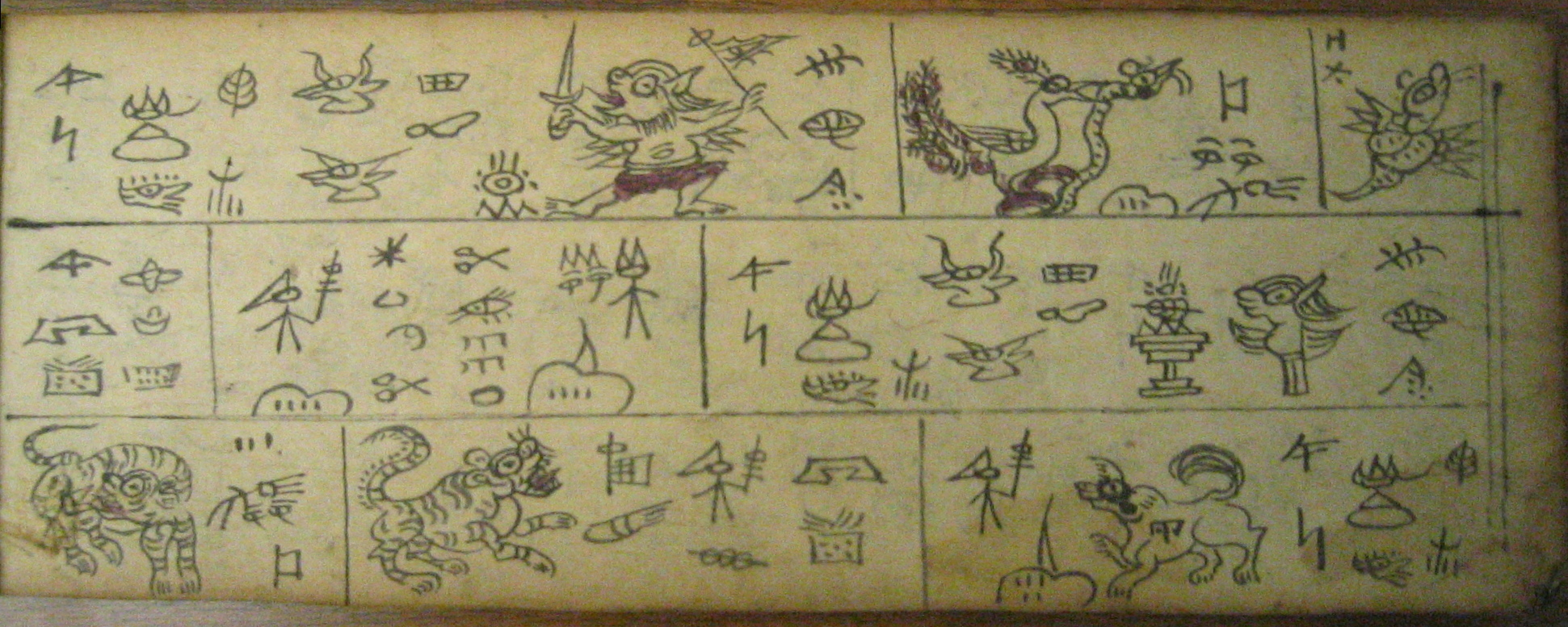 Naxi manuscript